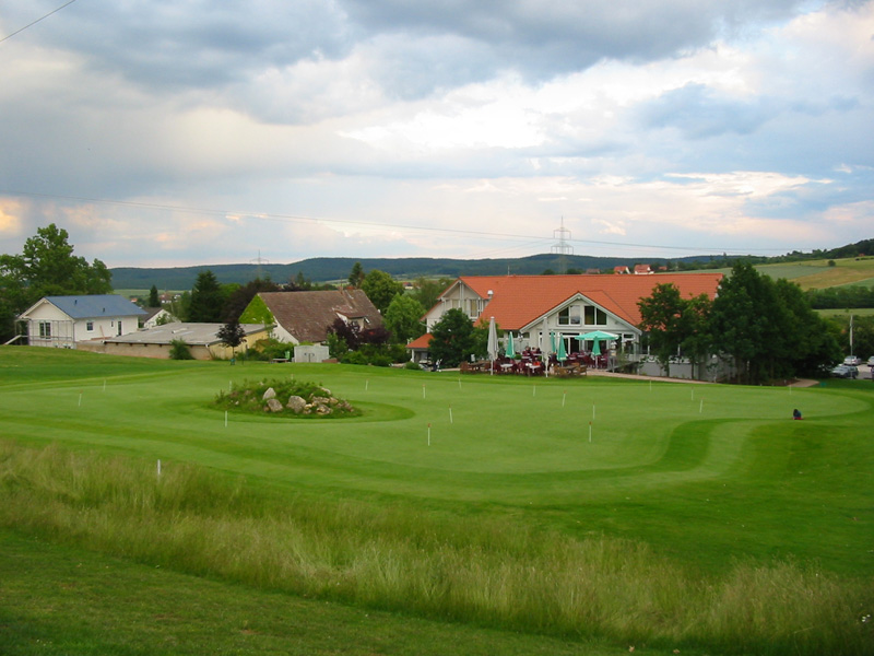 Putting Green and Clubhouse, Donnersberg Golfcourse, Börrstadt, Germany